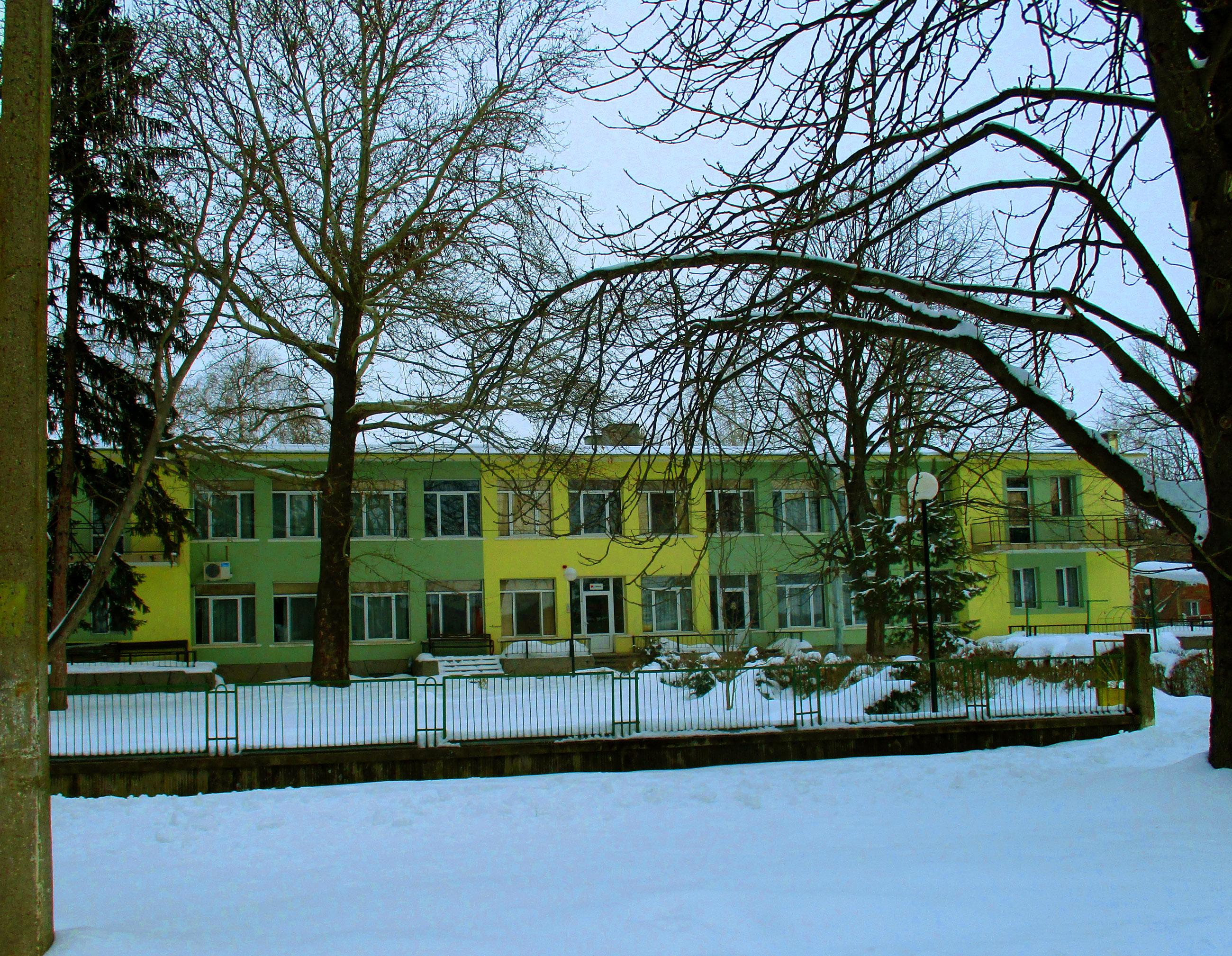 Бившата детска градина, сега дом за сираци